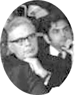 Title: Bonn, Tagung Forum für Entwicklungspolitik Factual corrections and alternative descriptions are encouraged separately from the original description. Additionally errors can be reported at this page to inform the Bundesarchiv. Original historic description: Erste Sitzung des Deutschen Forums für Entwicklungspolitik in der Bonner Beethovenhalle (Gäste: Erzbischof Camara und Bundespräsident Heinemann)